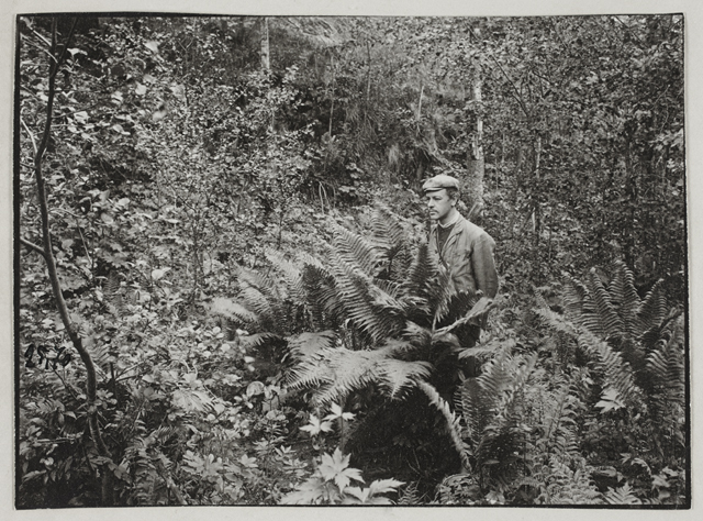 Museovirasto - Musketti vaaka, mustavalkoinen, ei painolaatuinen Kuvan käyttöoikeudet: CC BY 4.0 Kuva on julkaistu Nimeä 4.0 Kansainvälinen (CC BY 4.0)-lisenssillä. Verkkopalvelussa julkaistua näyttökuvaa voi käyttää vapaasti myös kaupallisessa käytössä. Kuvan yhteydessä on mainittava tekijä ja/tai kuvaaja sekä säilyttävän organisaation ja kokoelman nimi. Strutiopteris-kasvullisuutta Pötsövaaralla lähellä Sortavalaa